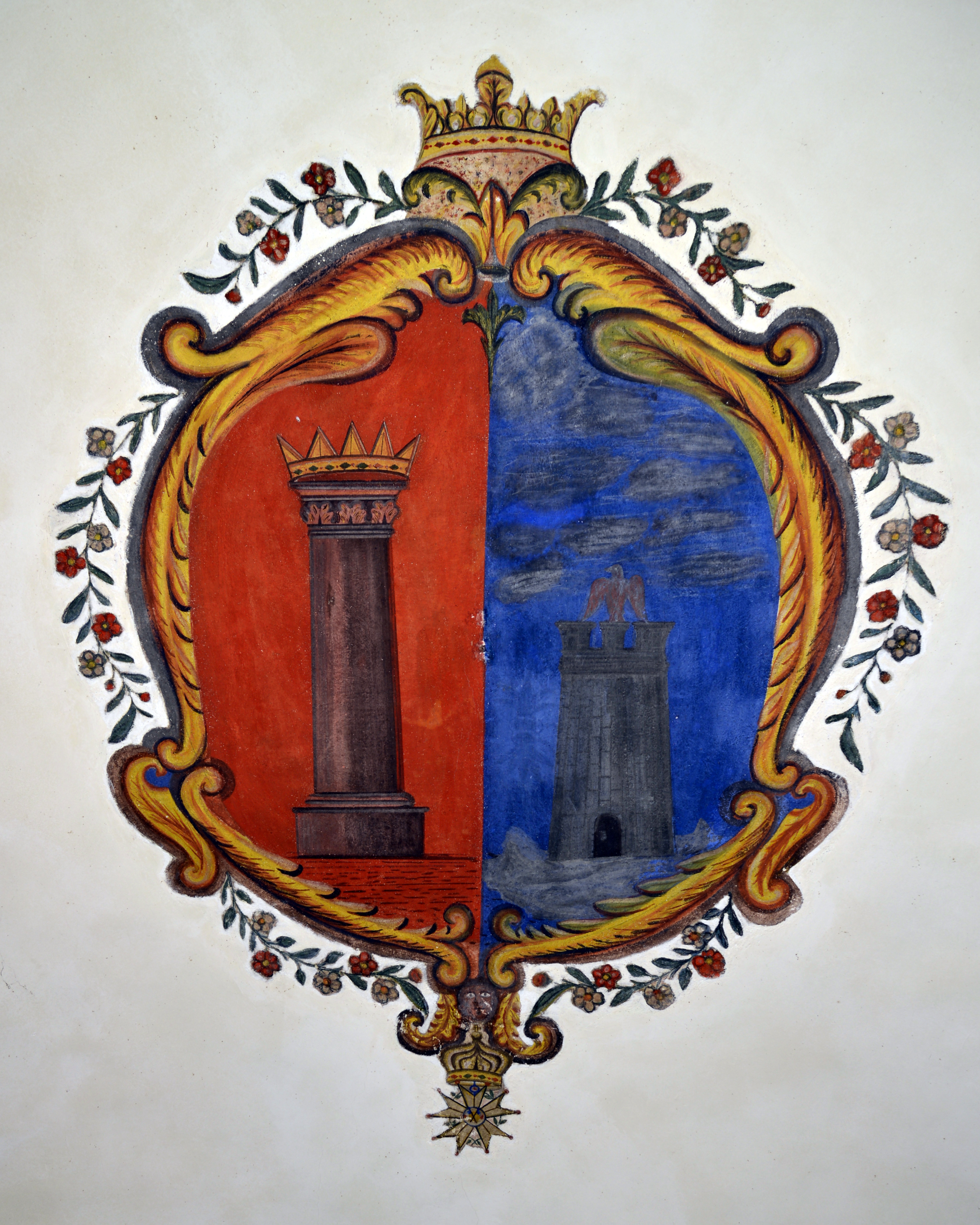 Montegrosso, Balagne (Corse) - Armoiries au plafond du séjour de la maison de la famille Anfriani